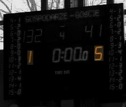 Tablica wyników z wyróżnionymi faulami drużyn w kwarcie